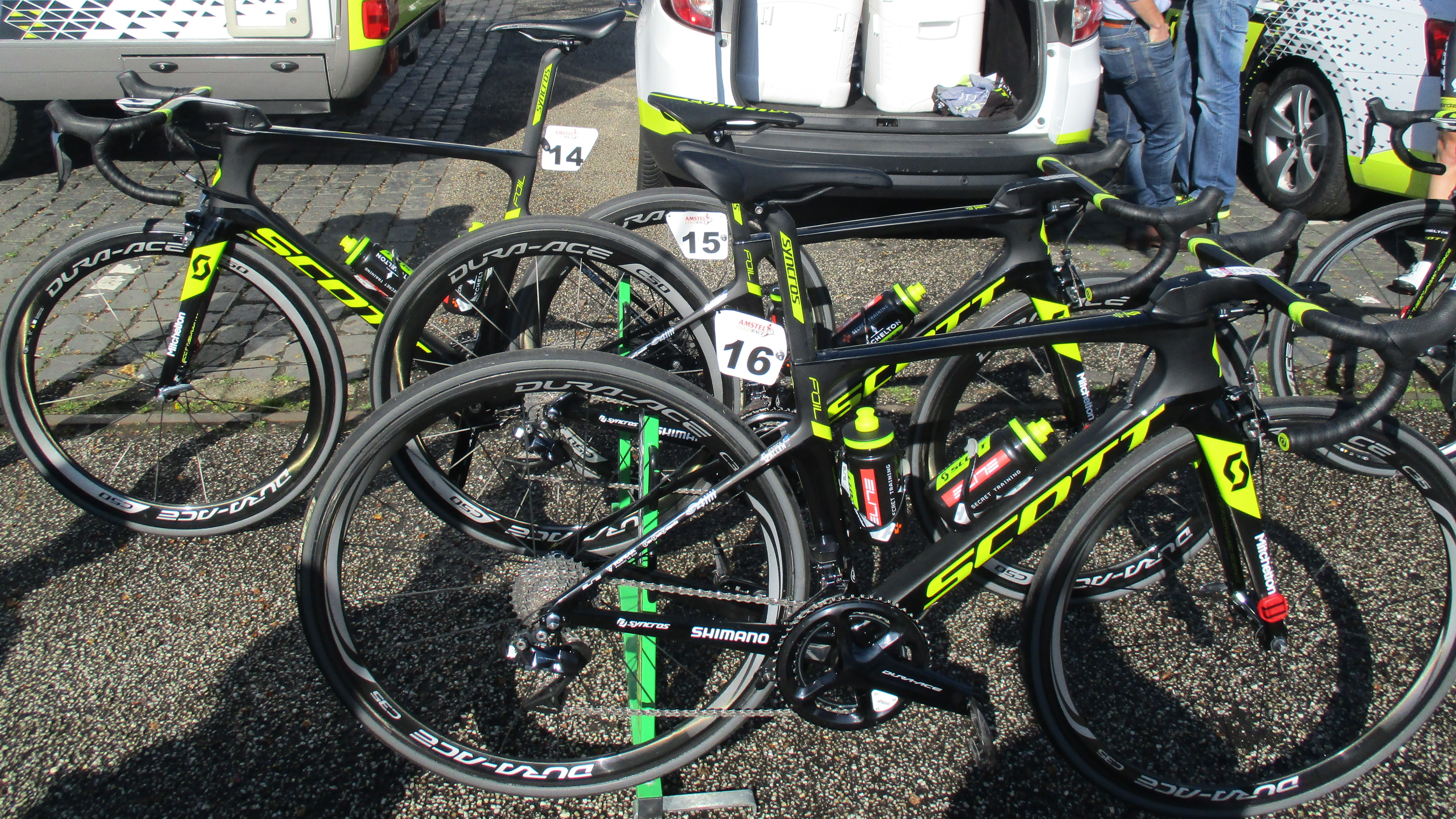 Start van de Amstel Gold Race Ladies Edition 2018 in Maastricht.